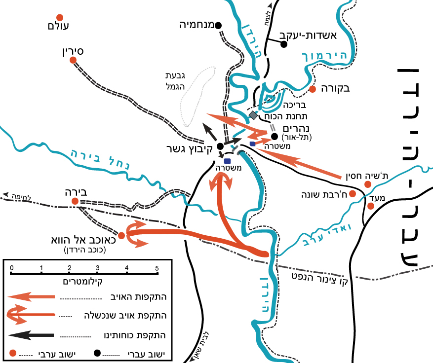 מפת הקרבות עם העיראקים באזור קיבוץ גשר מבוסס על [1]